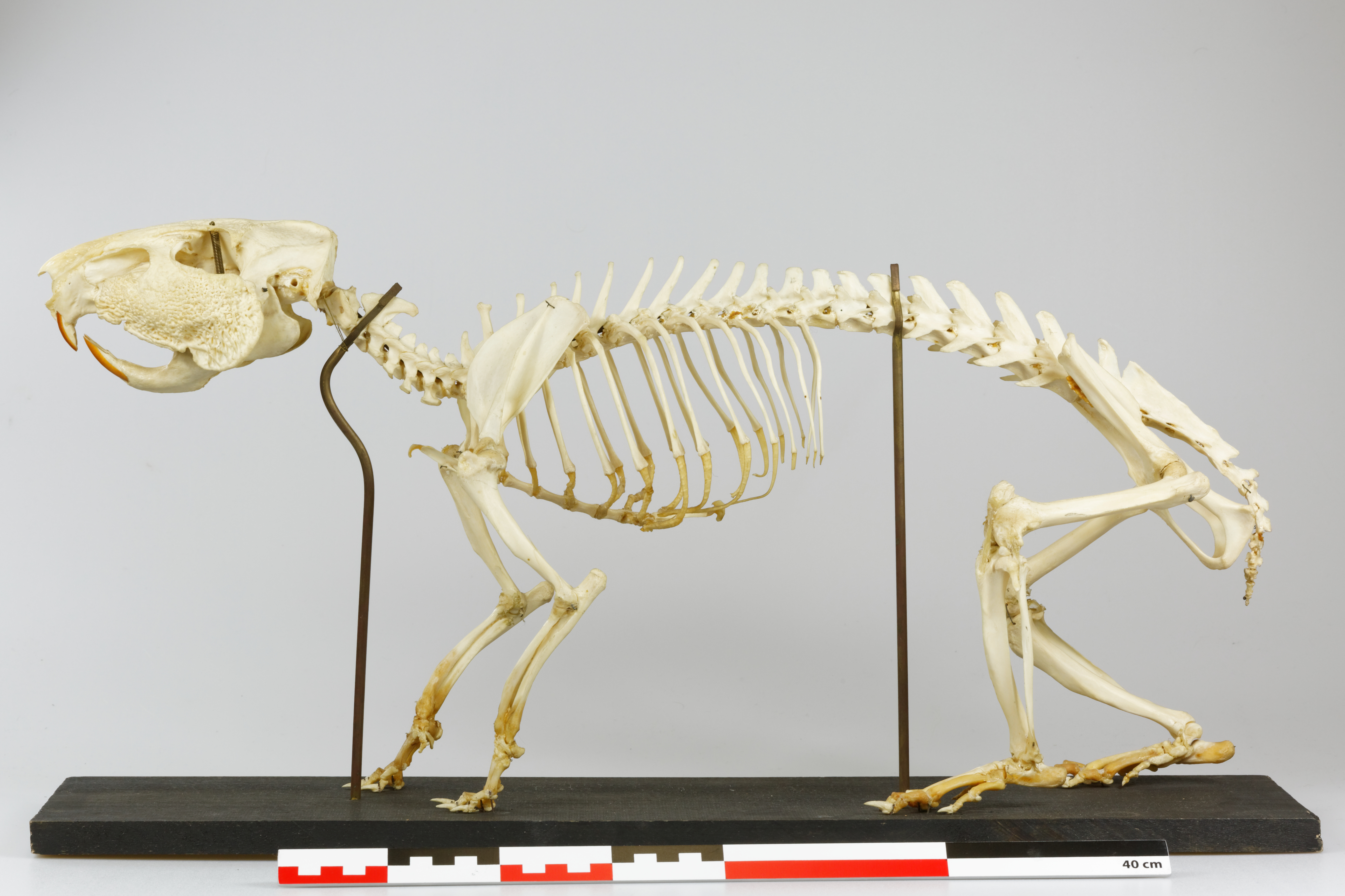 Un paca - Cuniculus pacas - de la collection de l'Université Pierre-et-Marie-Curie à Paris.